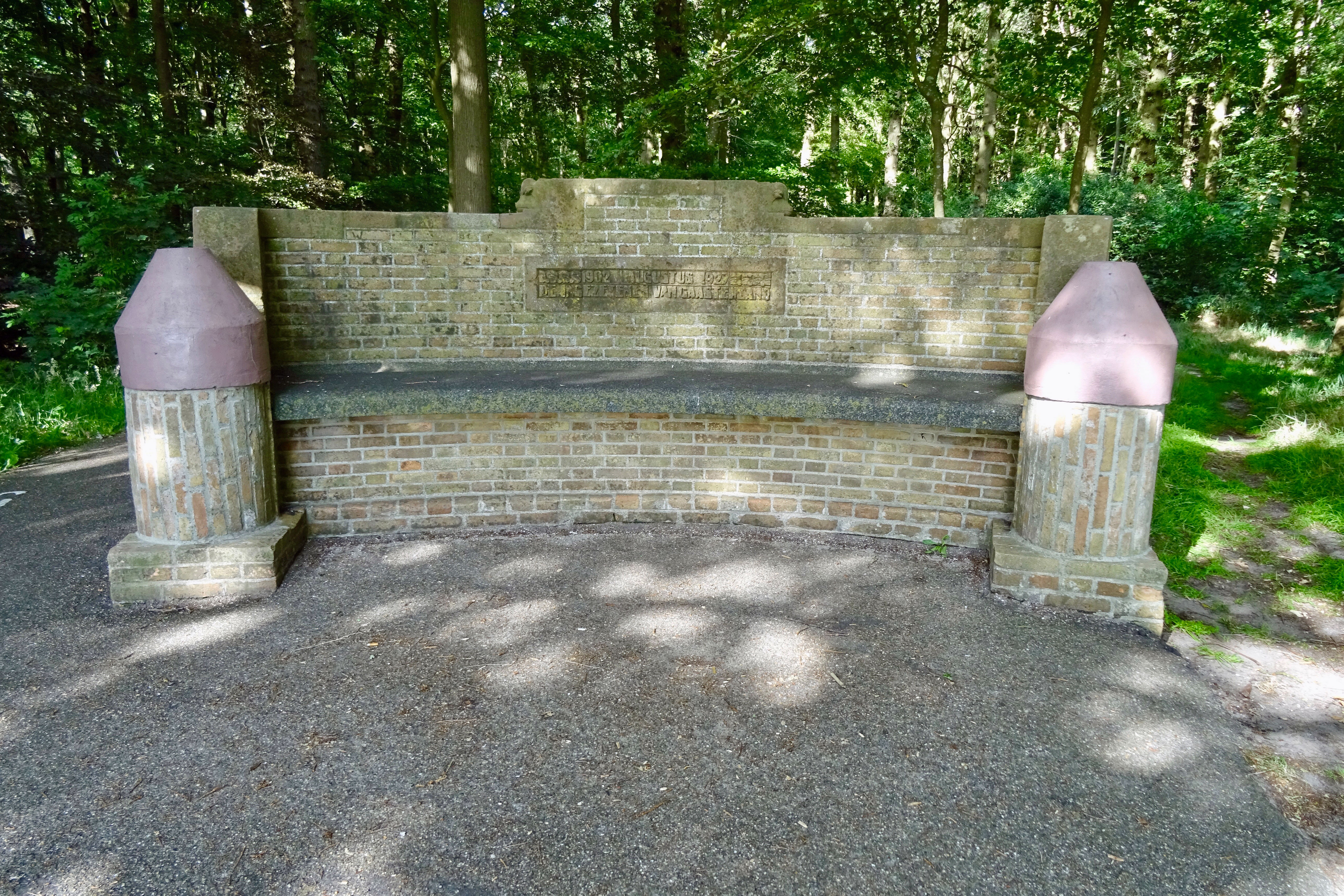 Gaaikemabank in het Jolderenbosk (Jolderenbos)